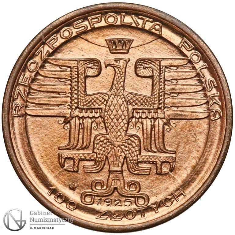 Próba bez napisu 100 złotych 1925 mały Kopernik awers brąz